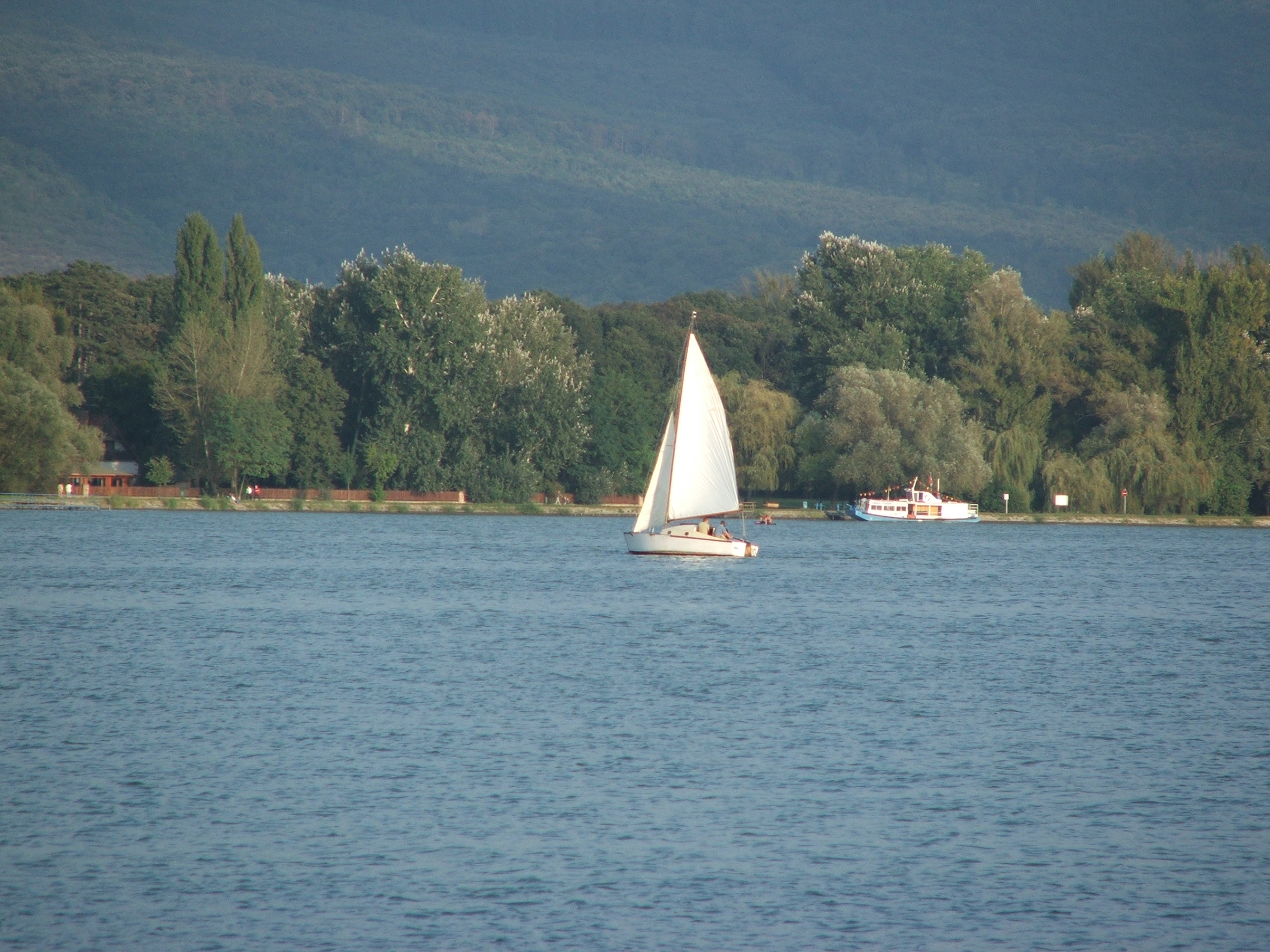 Yacht in Öreg-tó(Old Lake), Tata Photo: József Süveg (2005)